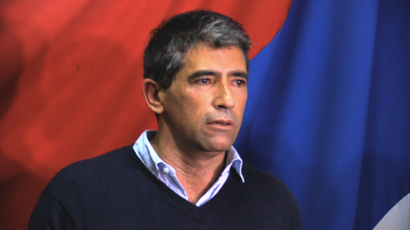 Raúl Sendic 2017